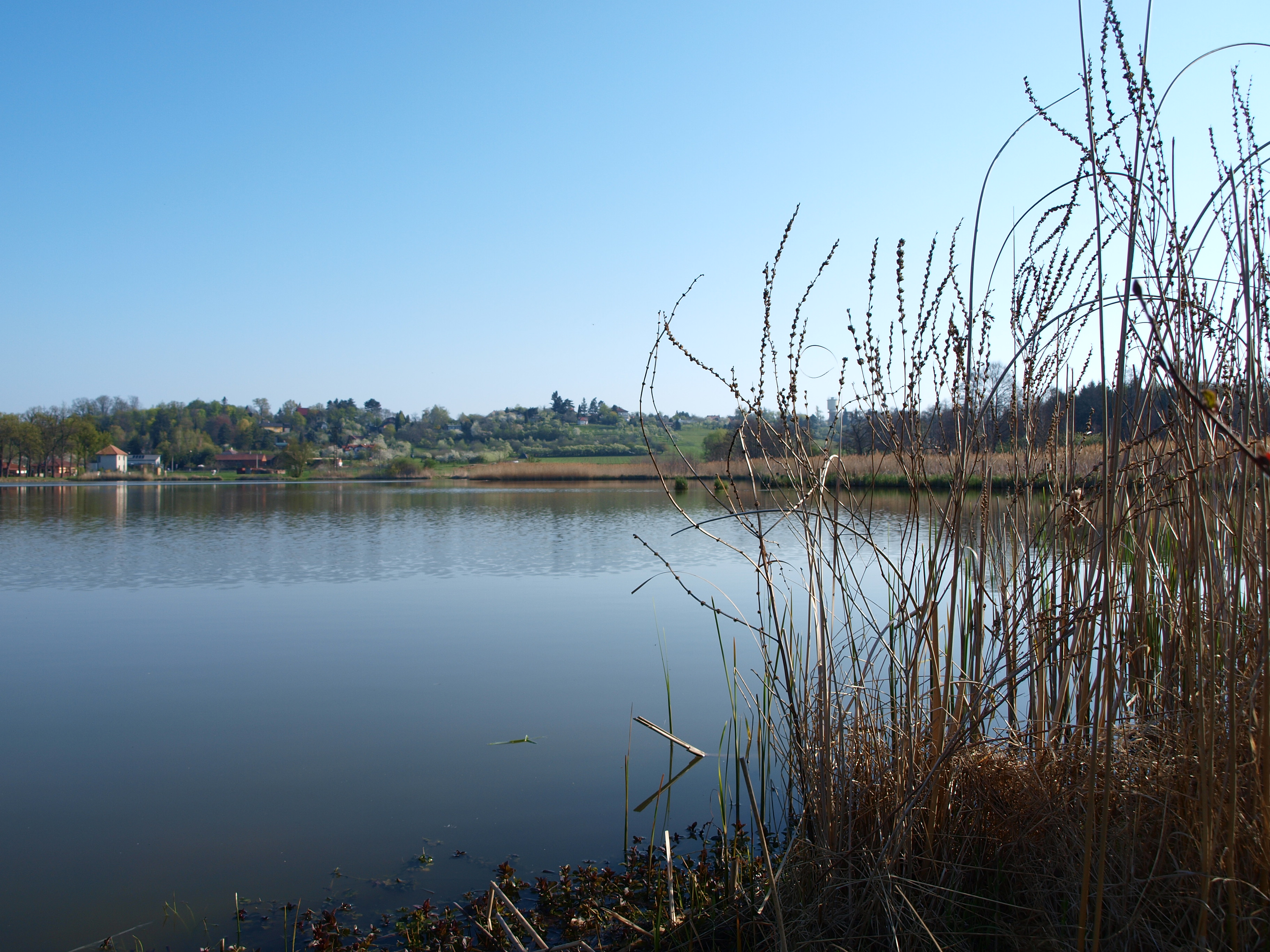 Litorální pásmo rybníka Roudnička, duben 2011.